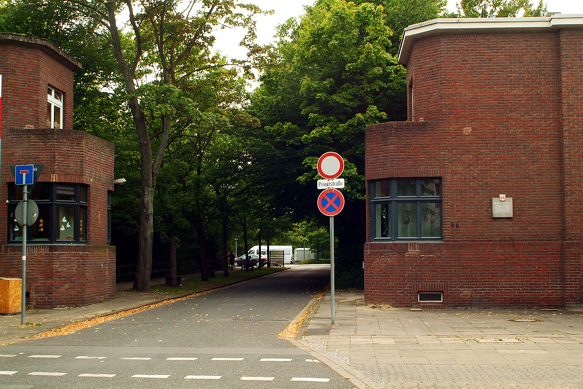 Die Einfahrt durch die ebenfalls von Henry van de Velde im Auftrag von Dannie N. Heineman errichteten Torhäuser unter der Adresse Brabeckstraße 86 in Hannover-Kirchrode führt über eine "Privatstraße" zum eigentlichen Heinemanhof ...